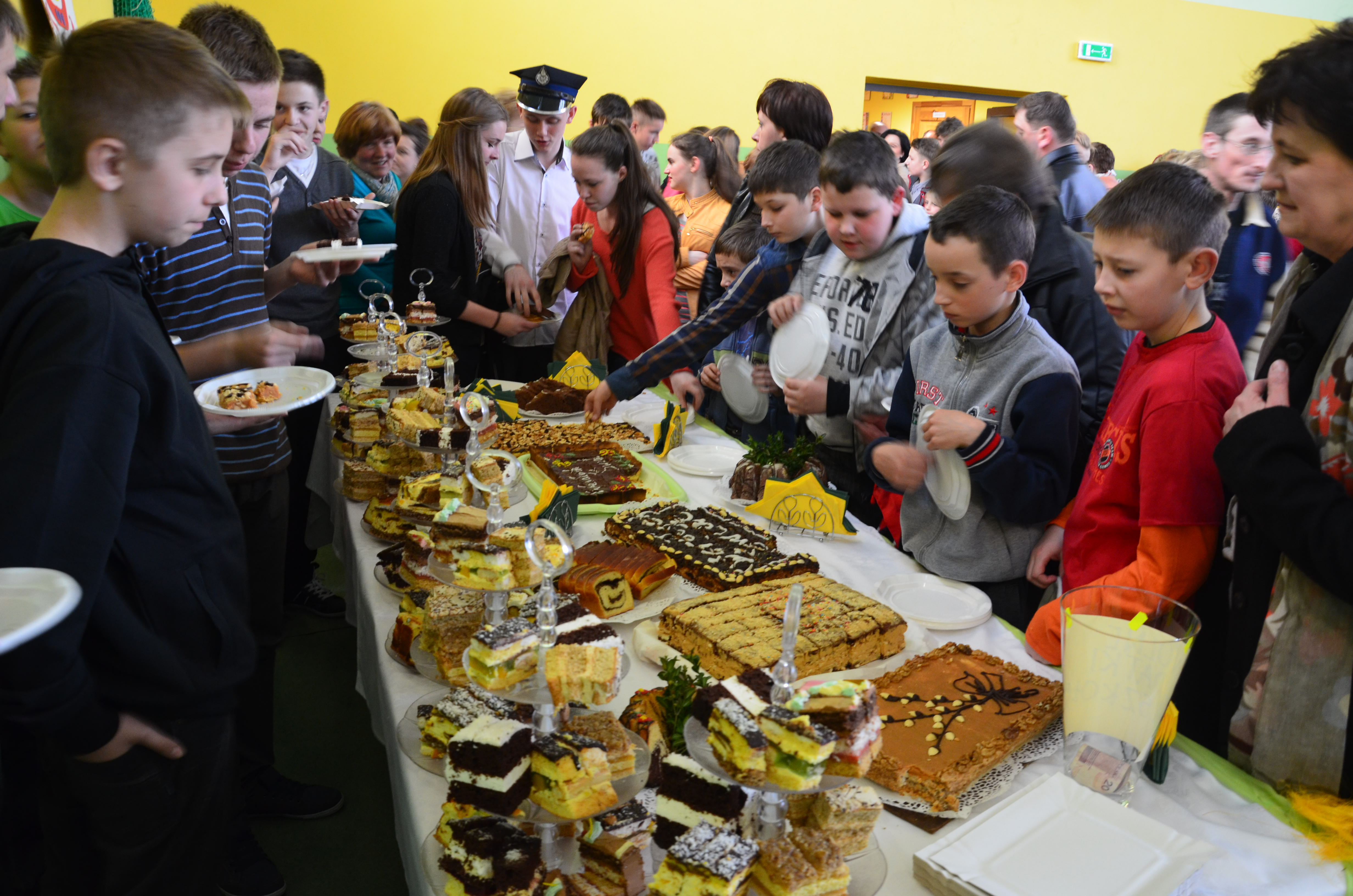 Nowotaniec Osterkirmes 2014 bei Sanok